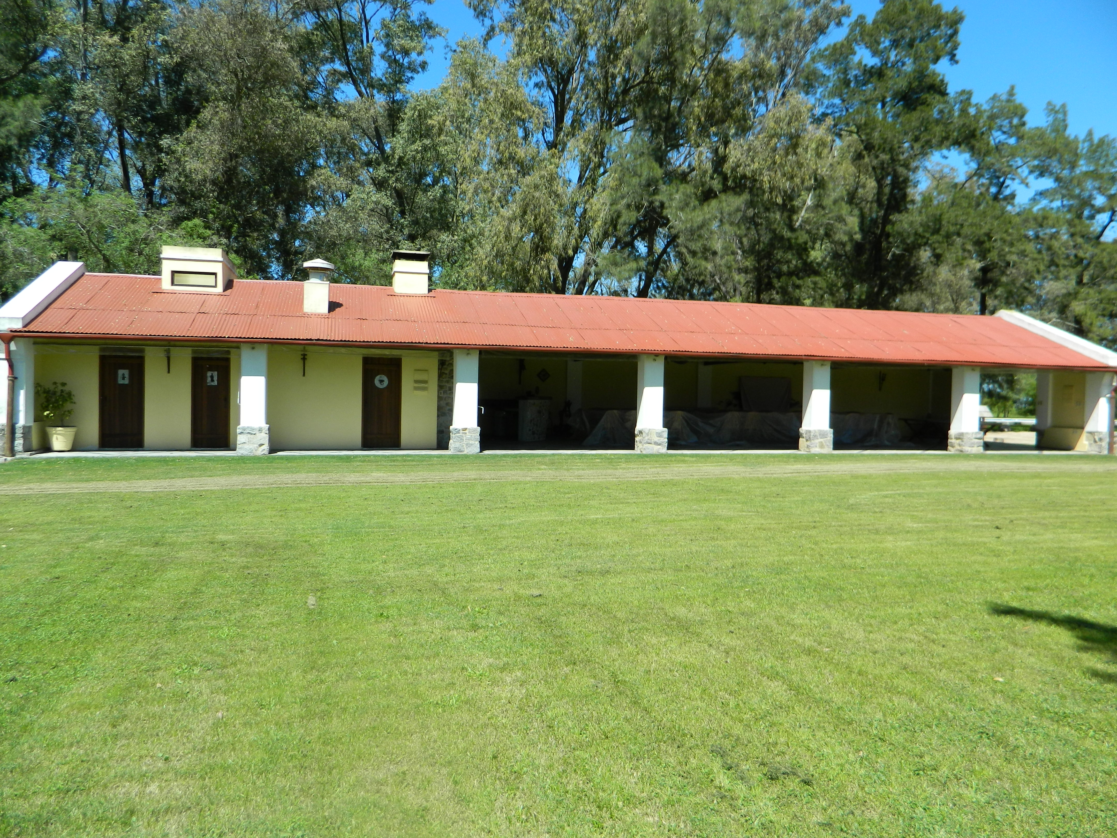 Estancia La Estíria en el Departamento de Flores, Uruguay